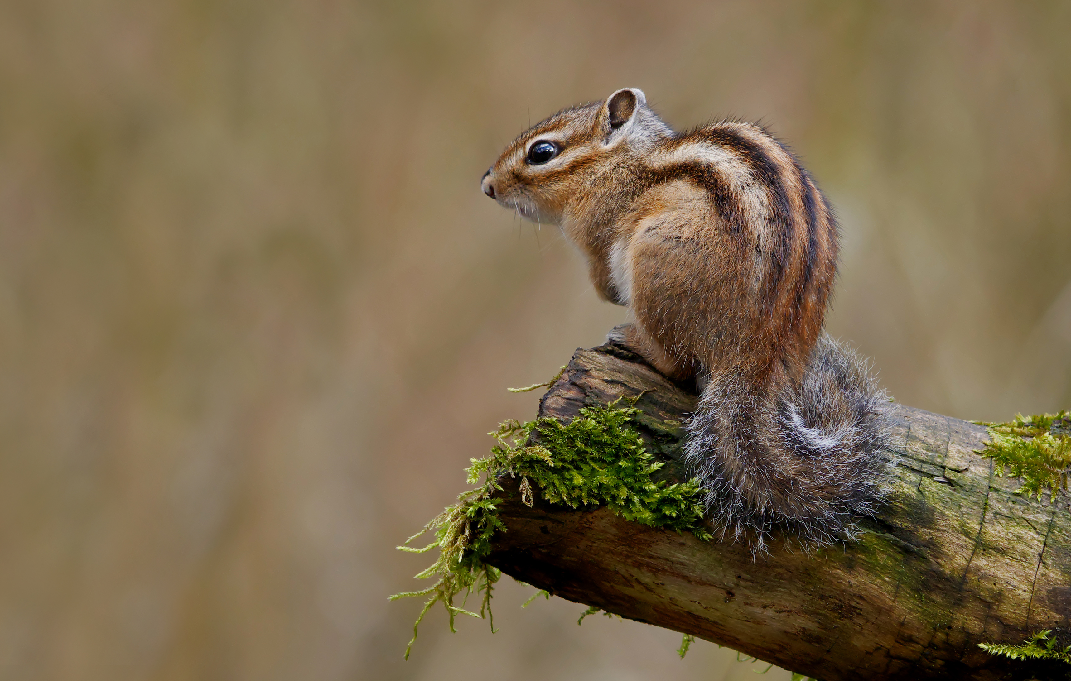 Panasonic GX7 + Panasonic Lumix G Vario 100-300, O.I.S